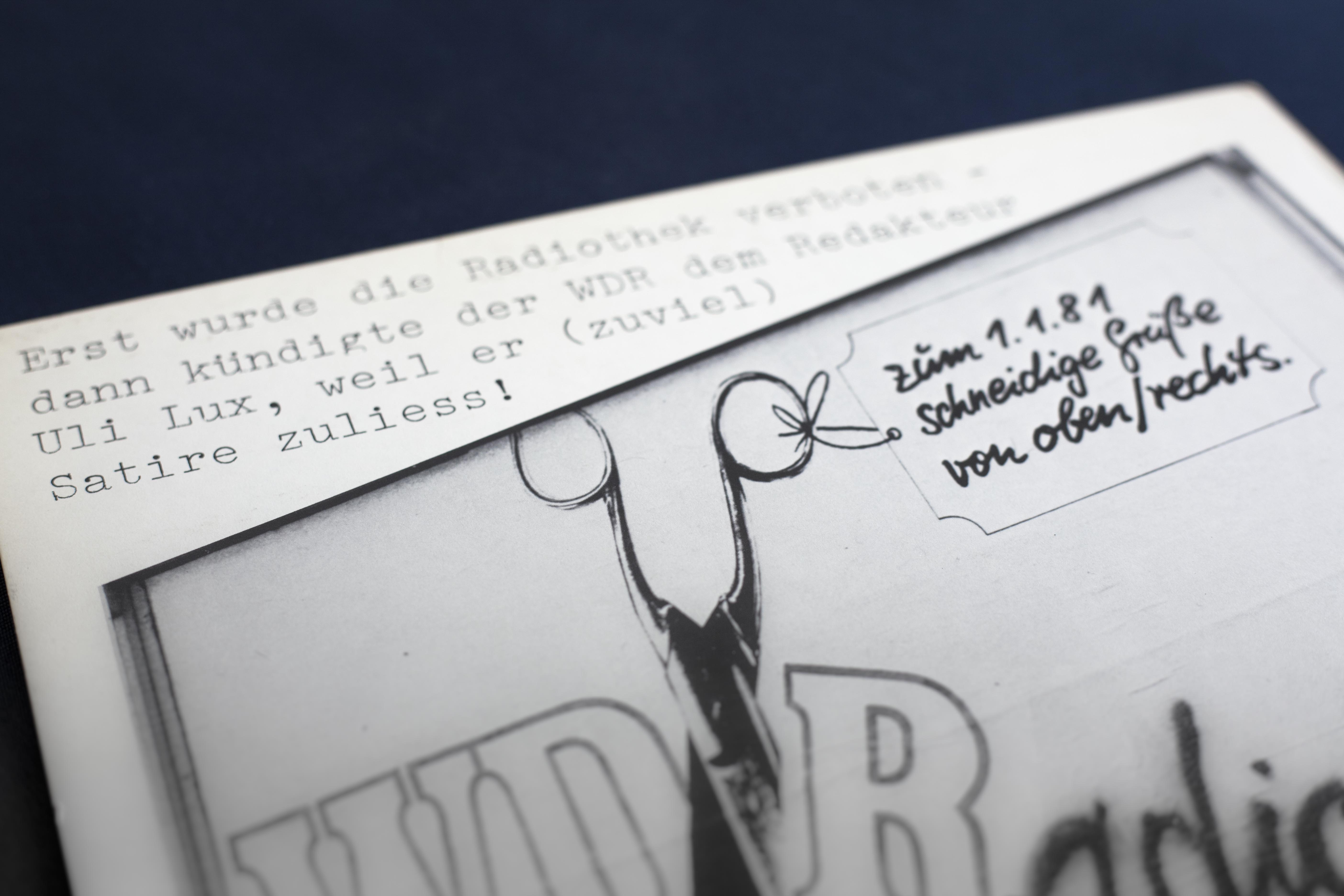 Foto mit einem Detail der Rückseite von "Radiothek unterwegs", einer Langspielplatte mit Ausschnitten aus der letzten Radiothek-Sendung vom 30.12.80, erscheinen Anfang 1981 beim Verlag Aaah! (R 301280). Die Abbildung basiert auf einem in Köln aufgehängten und fotografierten Plakat von Manfred Spies.